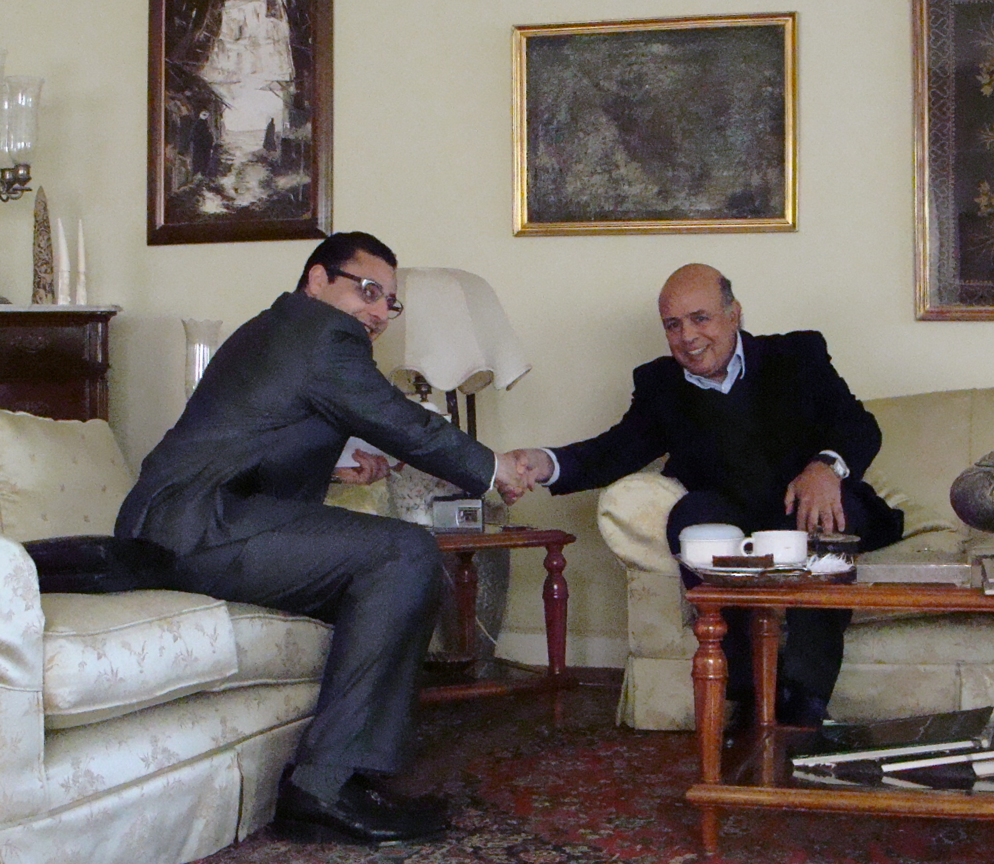 أبو النور